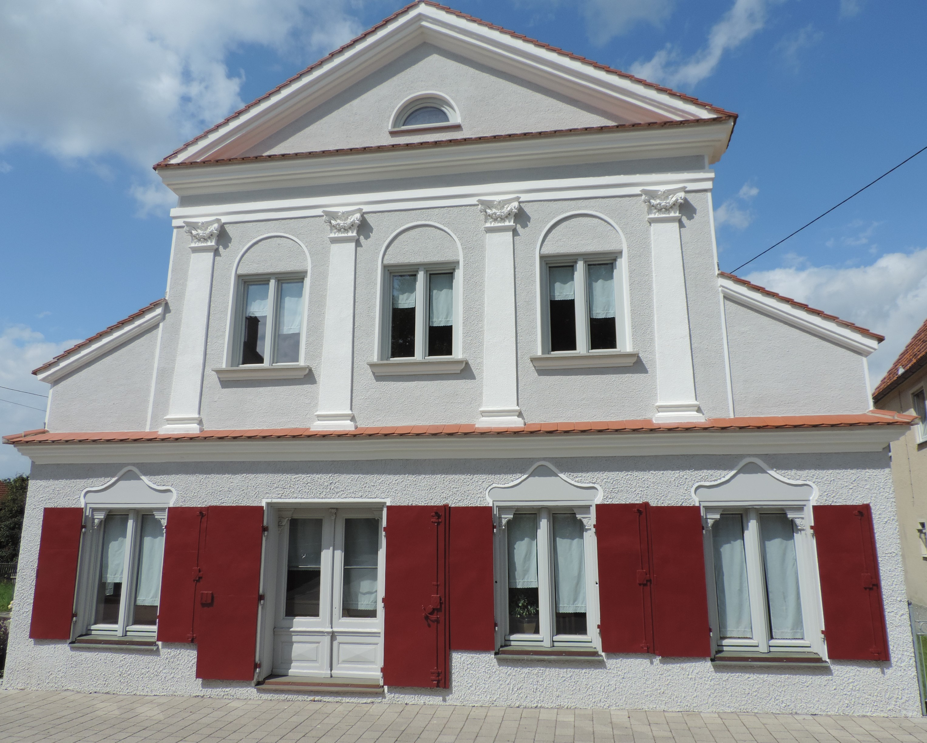 Schillingehaus in binswangen